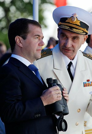 На параде боевых кораблей в честь Дня Военно-Морского Флота. С Главнокомандующим Военно-Морским Флотом России адмиралом Владимиром Высоцким.